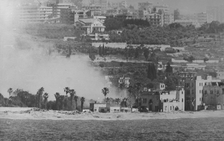 הפגזת מוצבי מחבלים בין בתי מגורים בחוף לבנון יוני 1982